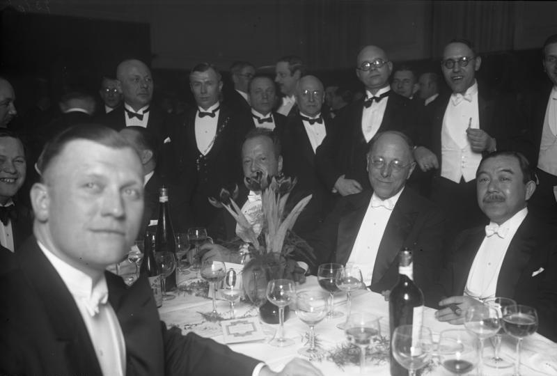 Mitglieder der Reichs- und Staatsbehörden bei dem Empfang des Verbandes der auswärtigen Presse im Schönberger Rathaus in Berlin! Kultusminister Dr. Becker (Mitte) und der japanische Botschafter in Berlin, an der Festtafel.